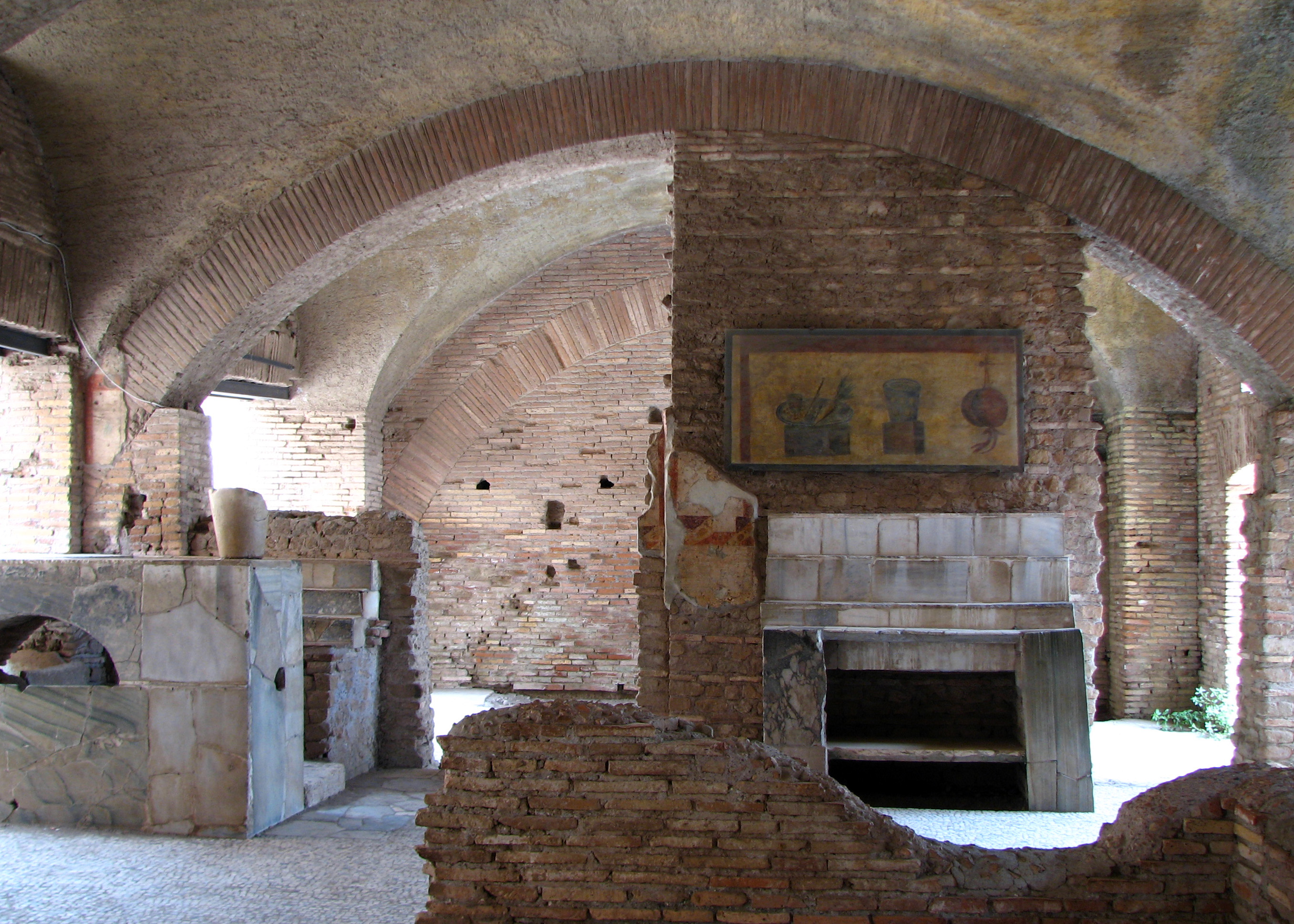 Thermopolium ad Ostia Antica, Roma, ItaliaIMG_1344 Ostia Antica